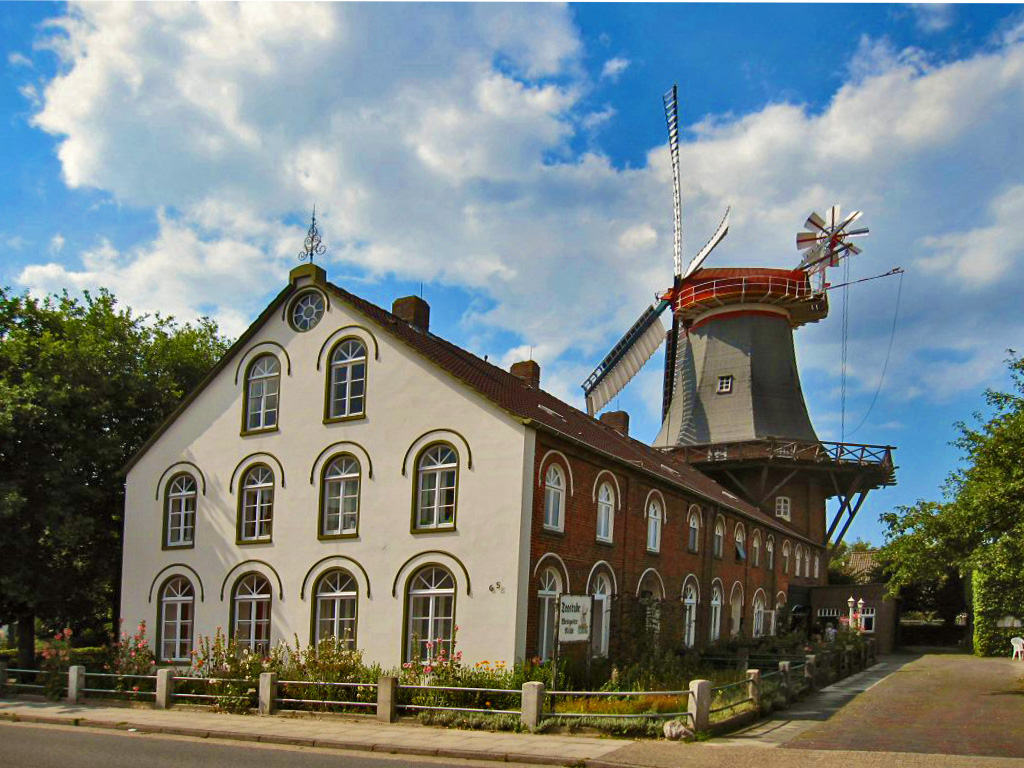 Westgaster Mühle in Norden (Ostfriesland)